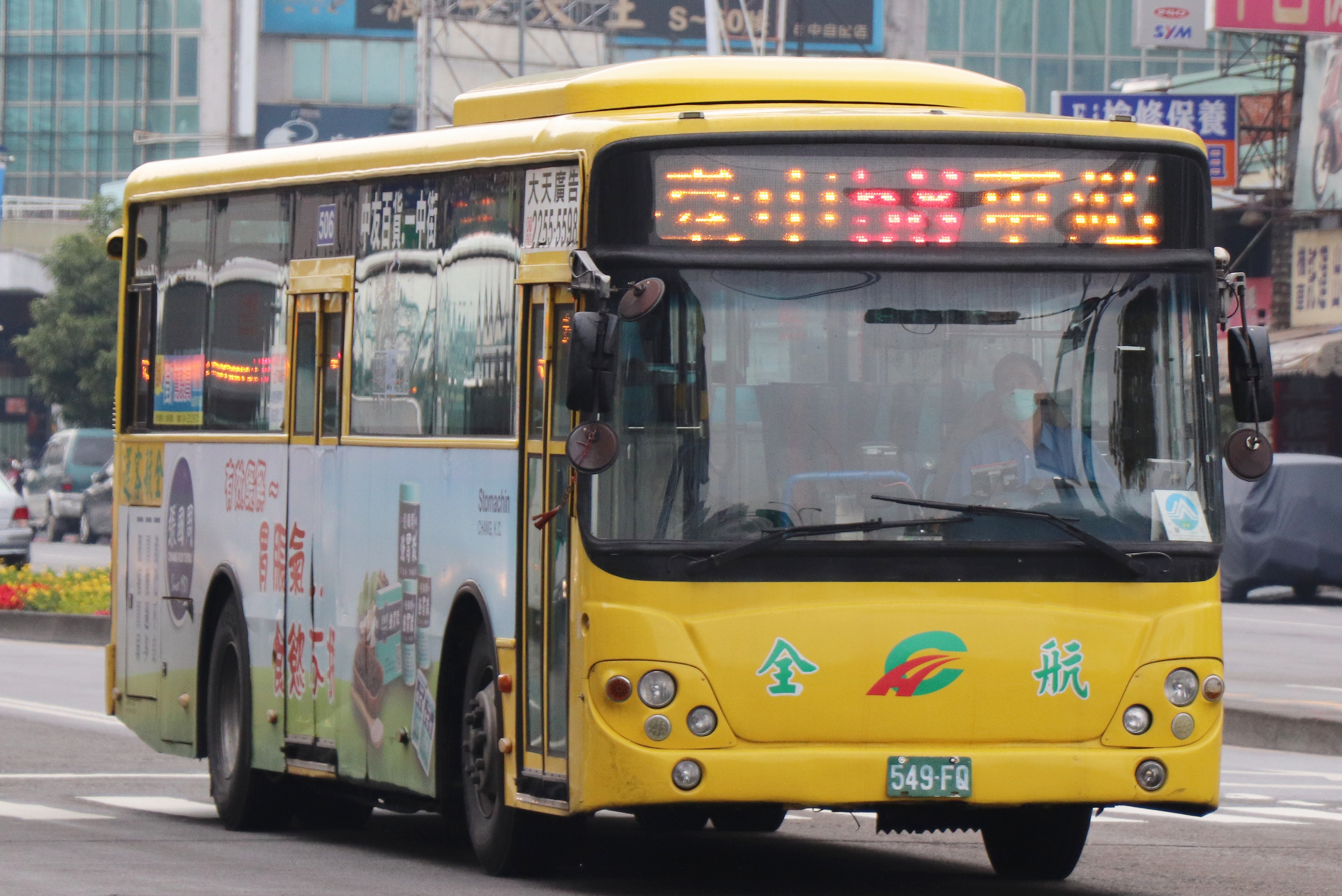 全航客運大宇BC211ML大客車 549-FQ